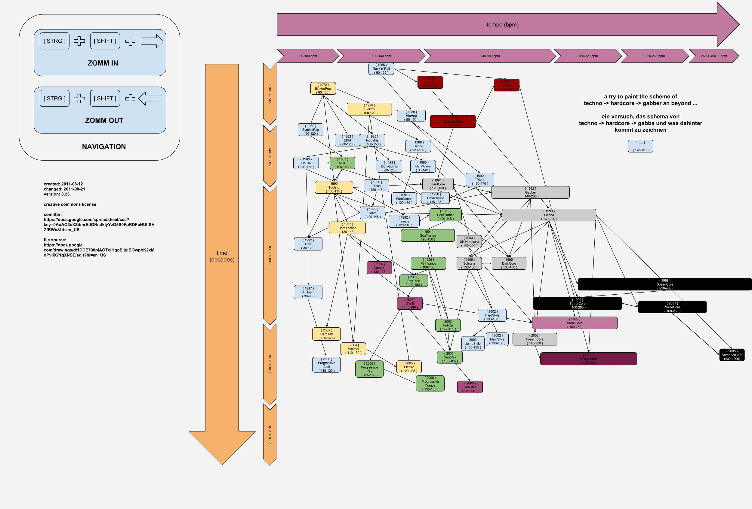 Hardcore, electronic music and other genres related to gabba and gabber